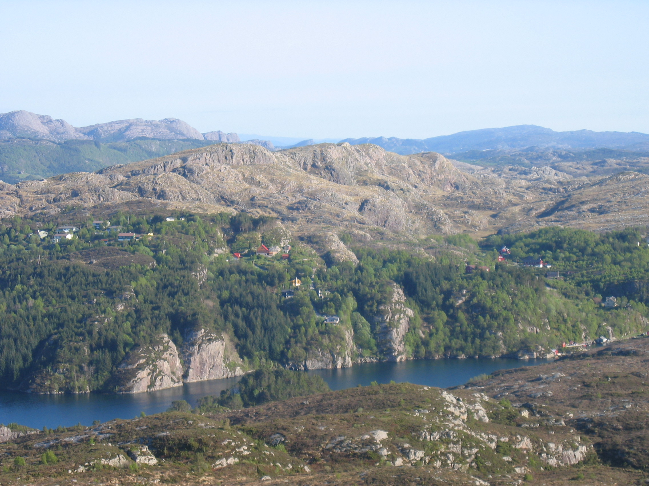 Bygda Fjæreide i Fjell kommune (Norge). Biletet er teke frå fjellet Hjeltevarden.